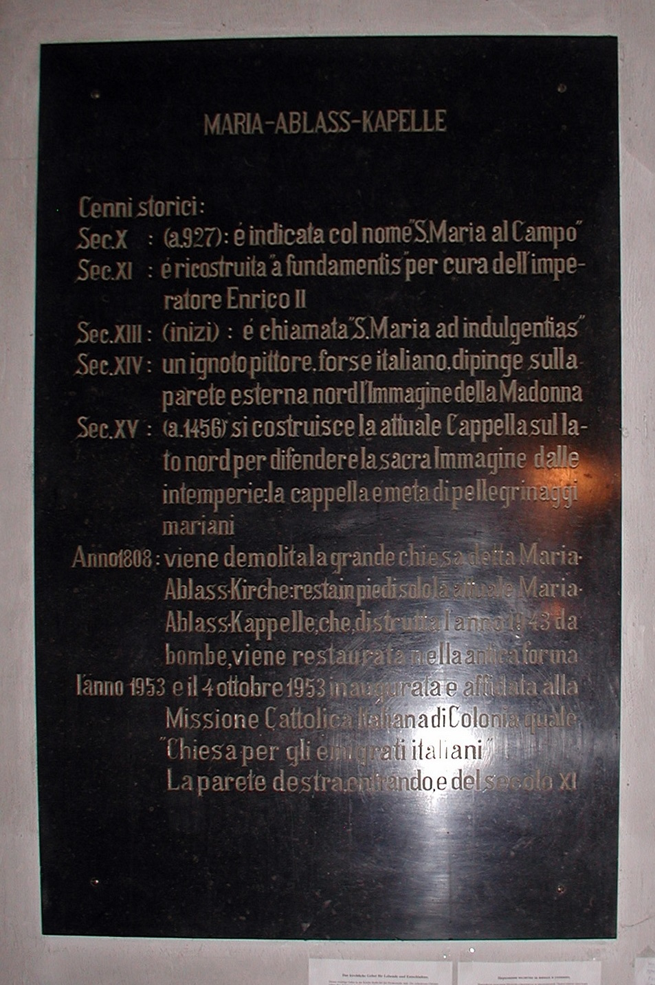 Köln, Maria-Ablass-Kapelle, Zeittafel (italienisch)